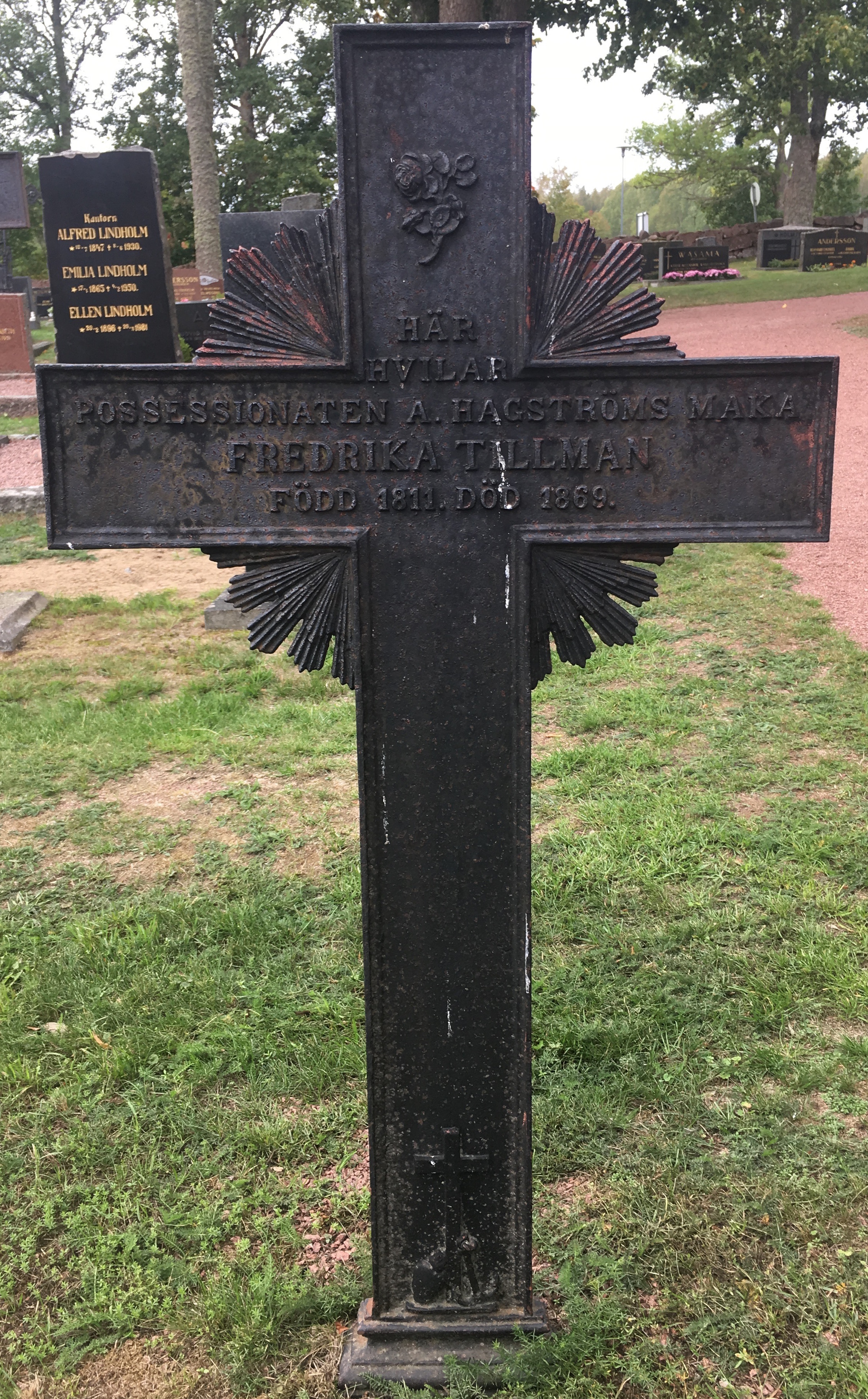 Belägg på ordet ”possessionat”